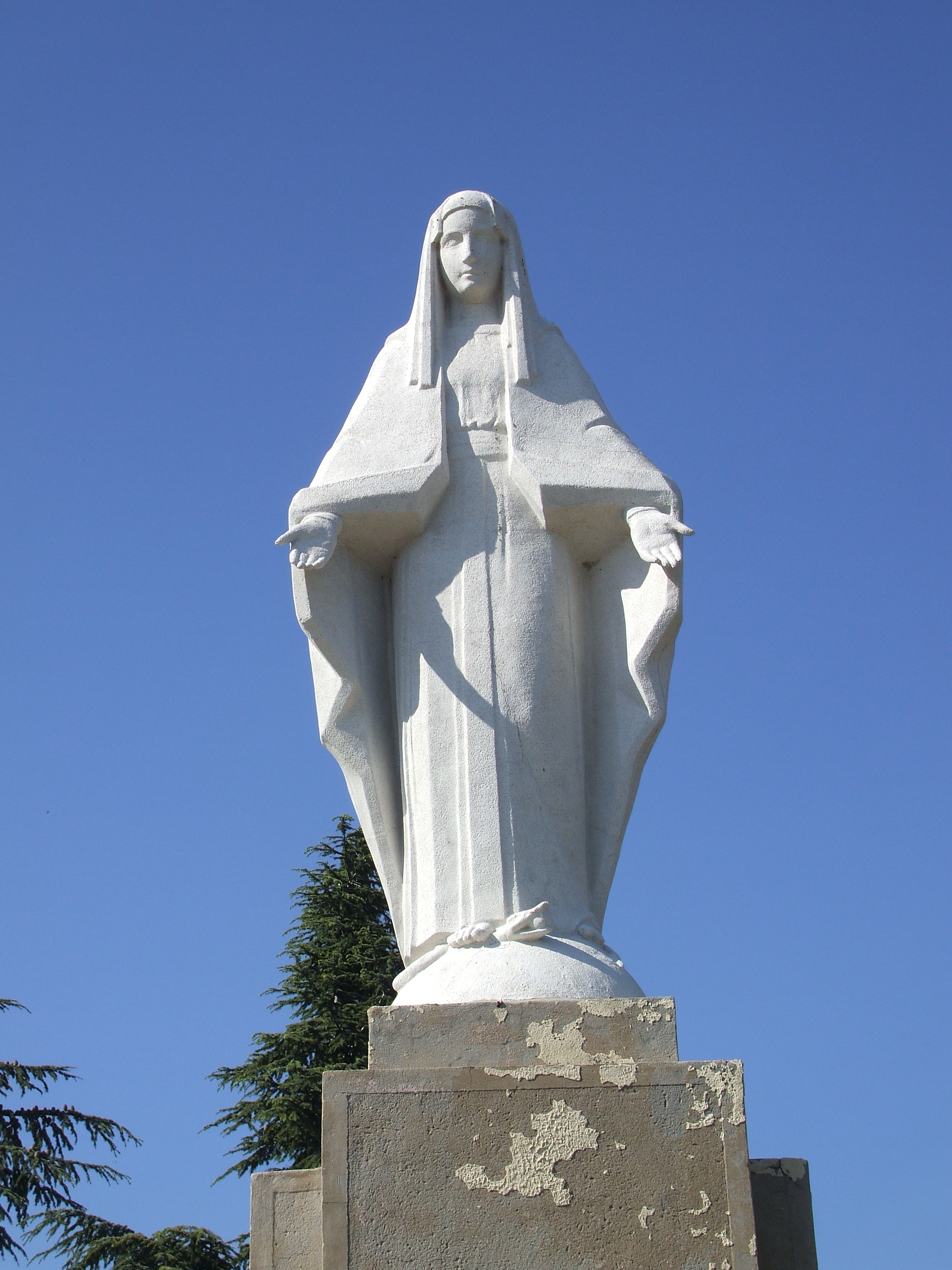 vierge